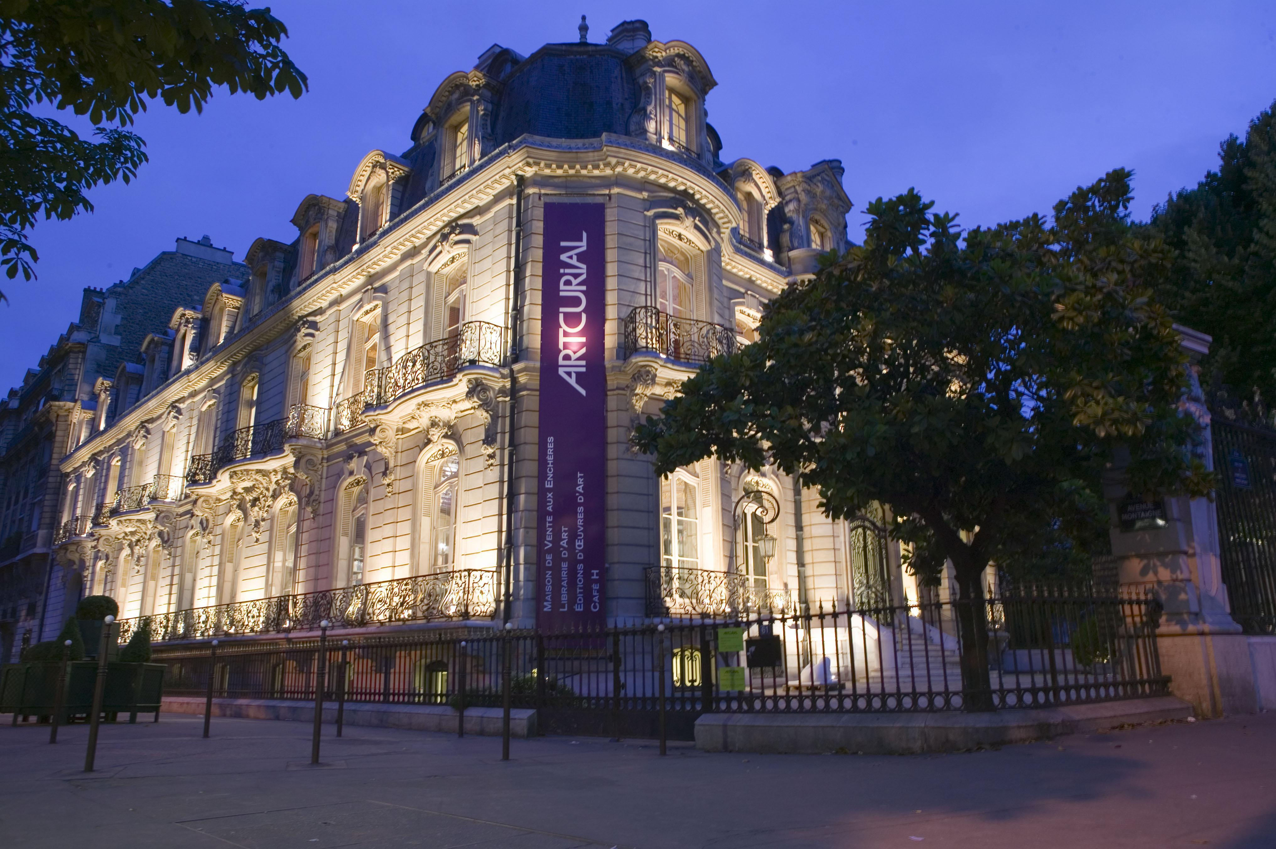 Hôtel Dassault, Paris, France.